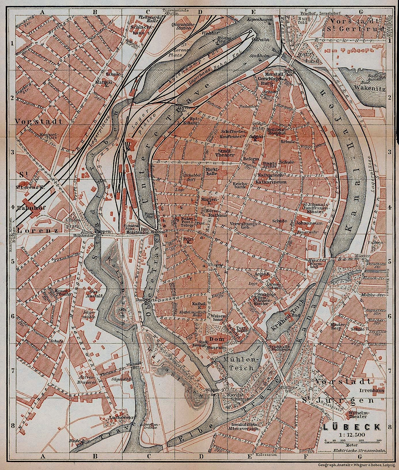 Stadtplan von Lübeck 1910.